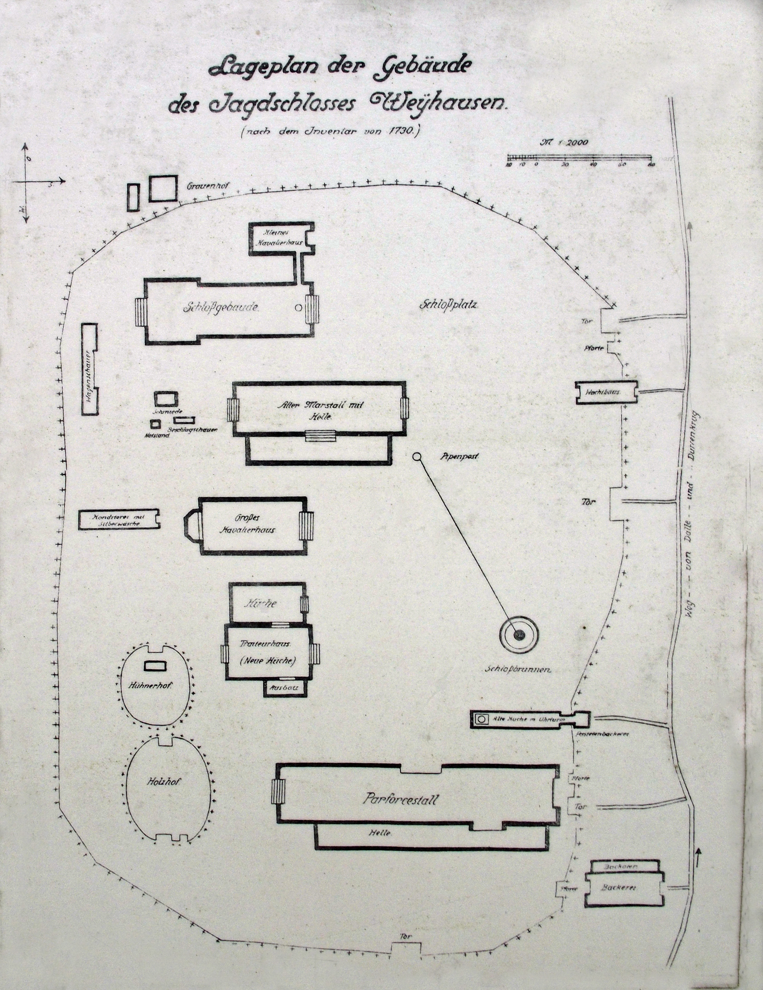 Plan der Jagdschlossgebäude Weyhausen (Infotafel vor Ort)